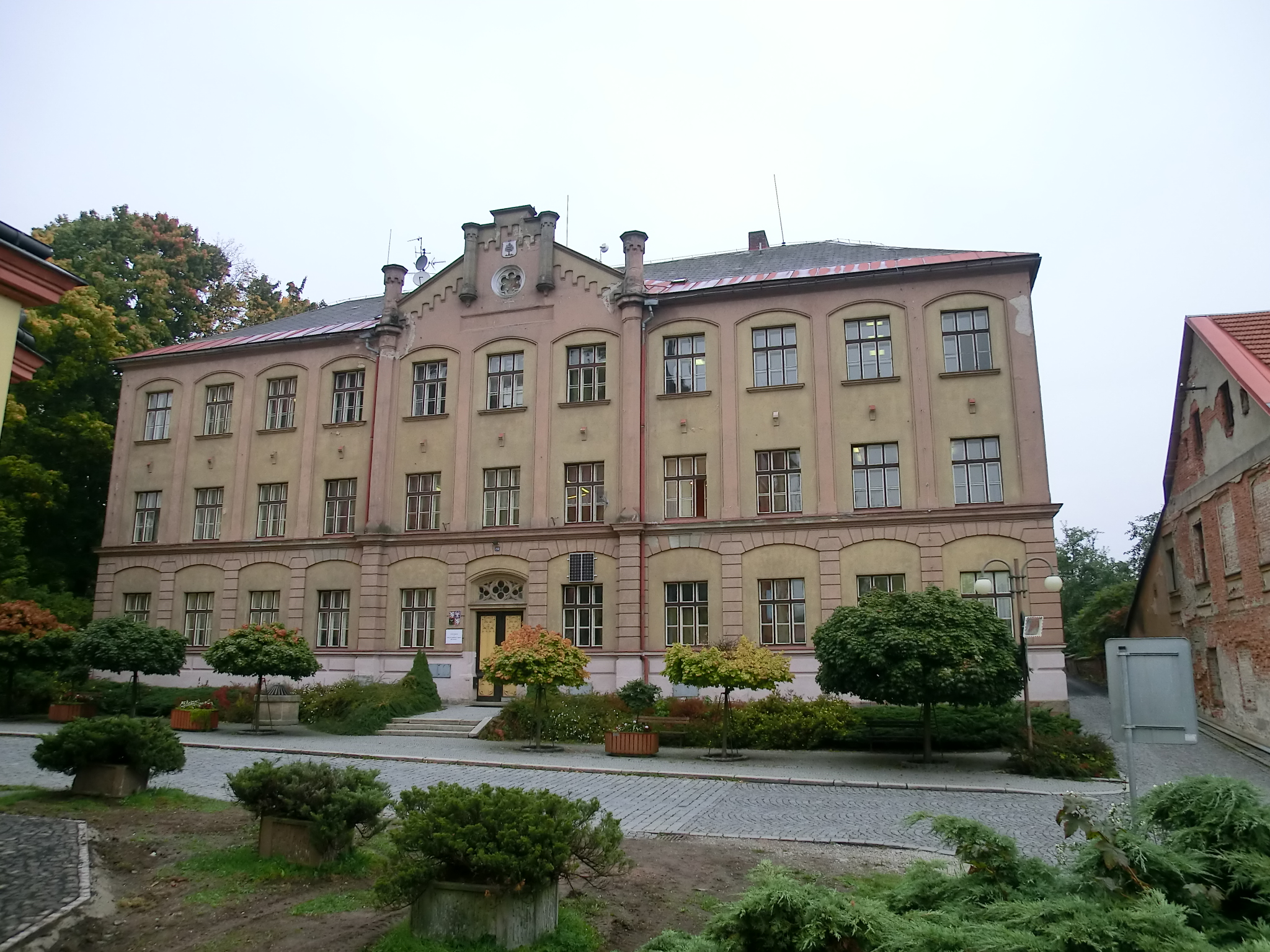 Celkový pohled na budovu bývalé Chlapecké školy, dnes Gymnázia v Jilemnici.